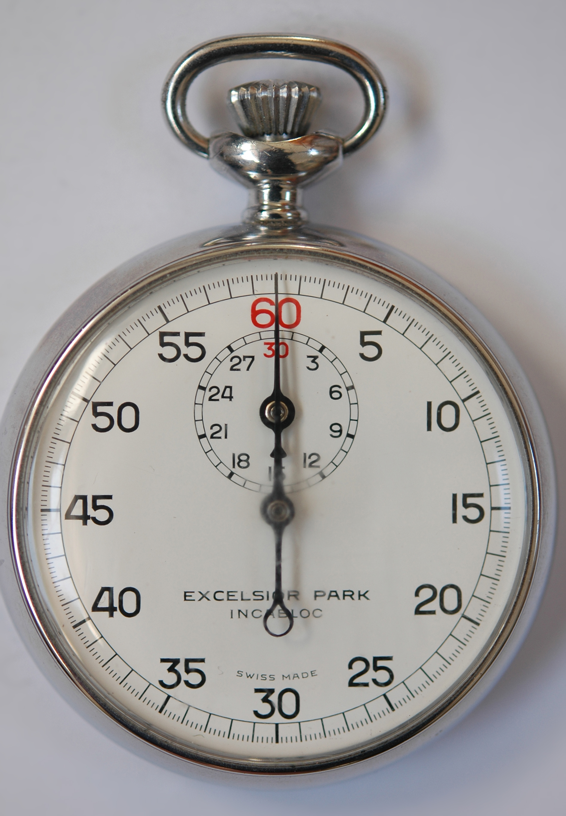 Mechanische stopwatch